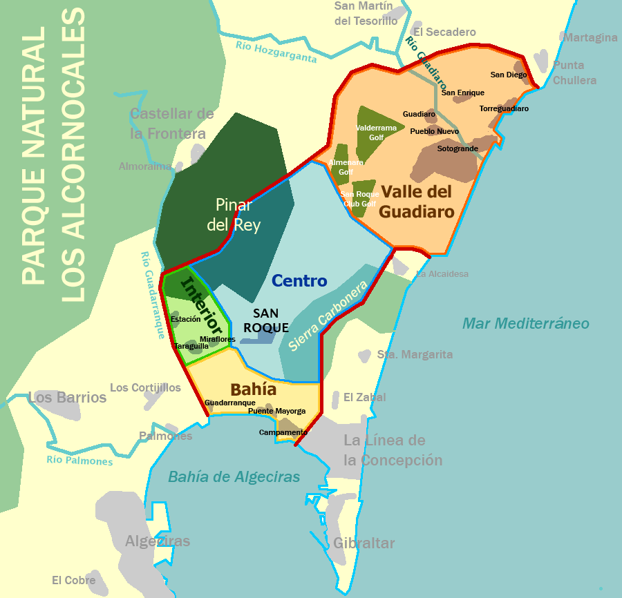 Situación del término municipal de San Roque, barriadas, divisiones administrativas, espacios naturales y campos de golf.